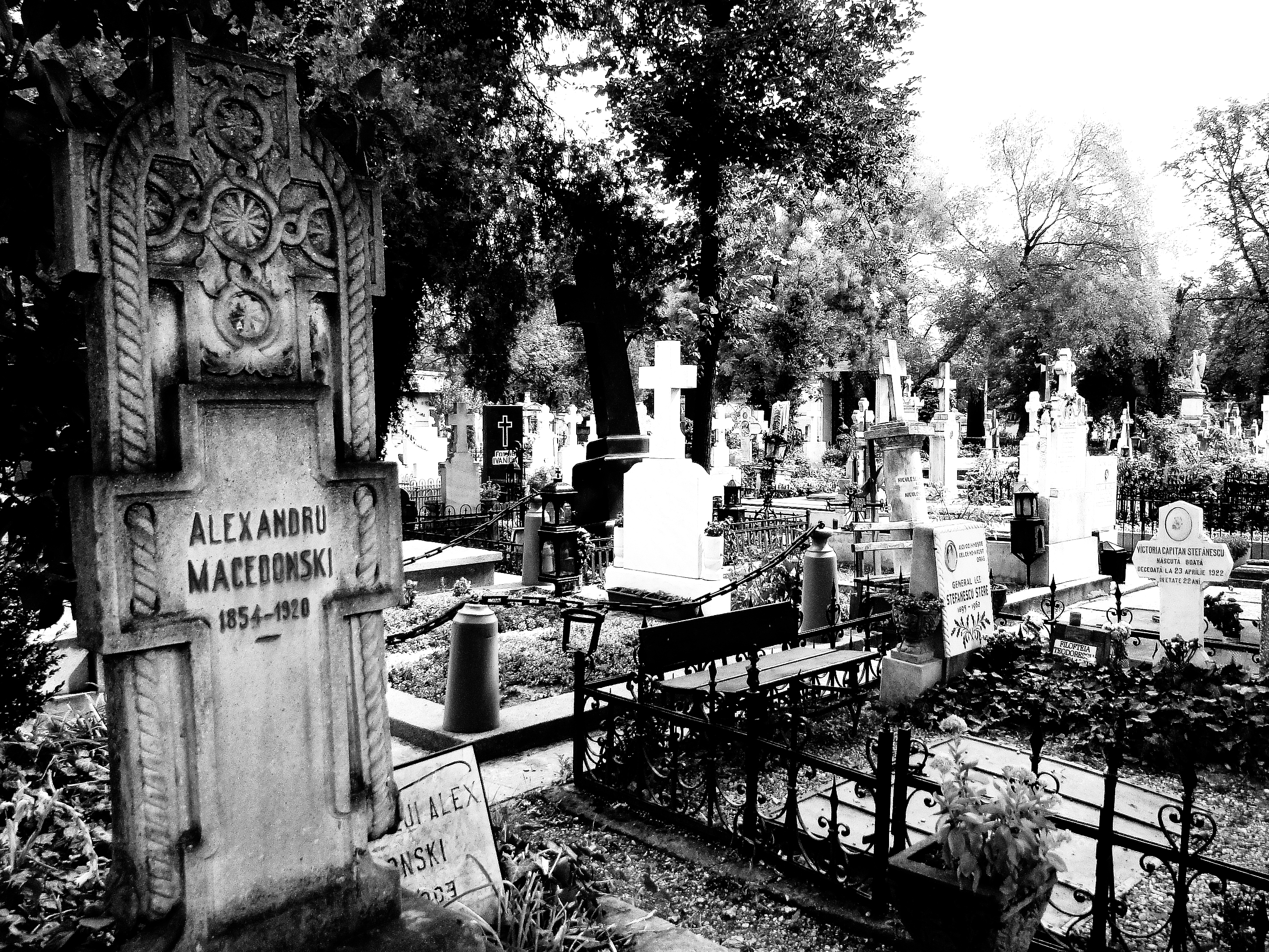 Mormântul lui Alexandru Macedonschi, Cimitirul Bellu, Bucuresti, Romania 083